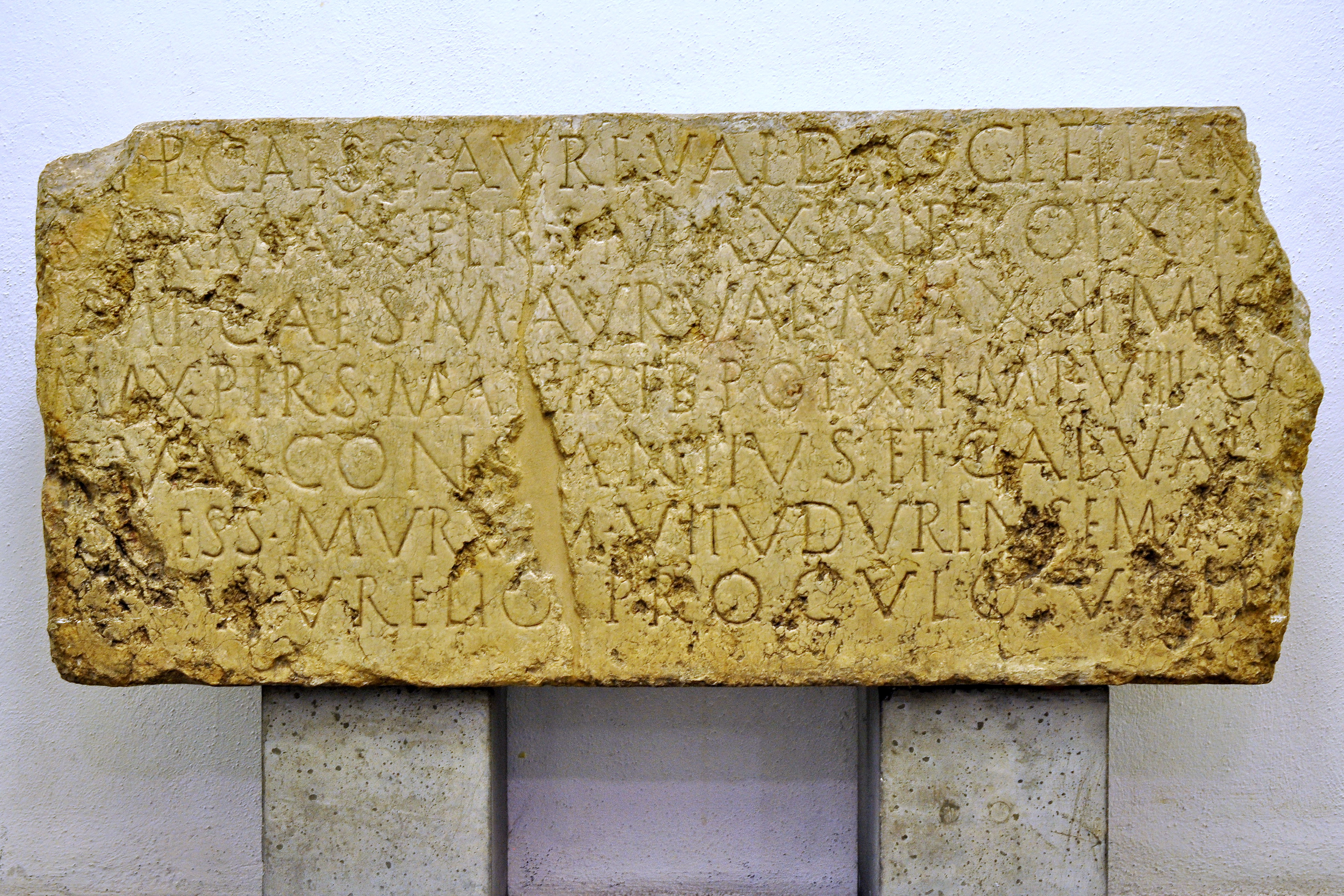 Vitudurum / Oberwinterthur, römischer Vicus, Gründungsstein des Kastells im Rathaus in Winterthur (Switzerland) CIL XIII, 5249: [I]MP(erator) CAES(ar) G(aius) AURE(lius) VAL(erius) DIOCLETIAN[US PONT(ifex) MAX(imus) GER(manicus) MAX(imus) SAR(maticus) MAX(imus) PERS(icus) MAX(imus) TRIB(unicia) POT(estate) XI IM[P(erator)x CO(n)S(ul) V P(ater) P(atriae) PROCO(n)S(ul) ET IMP(erator) CAES(ar) M(arcus) AUR(elius) VAL(erius) MAXIMIA[N(us) PONT(ifex) MAX(imus) GER(manicus) MAX(imus) SAR(maticus) MAX(imus) PERS(icus) MA[X(imus) TRIB(unicia) POT(estate) X IMP(erator) VIIII CO[(n)S(ul) IIII P(ater) P(atriae) PROCO(n)S(ul) P(ii) F(elices) INV(icti) AUG(usti) ET VAL(erius) CONS[T]ANTIUS ET GAL(erius) VAL(erius) [MAXSIMIANUS NOBILISS(imi) CA]ES(are)S MURUM VITUDURENSEM A S[OLO] SUMPTU SUO FECER(unt) AURELIO PROCULO V(iro) P(erfectissimo) PR[AES(ide) PROV(inciae) CURANTE].“ Übersetzung gemäss Helmut Maurer, Konstanz im Mittelalter: 1. Von den Anfängen bis zum Konzil: Der Kaiser Gaius Aurelius Valerius Diocletianus, grösster Germanensieger, grösster Sarmatensieger, grösster Persersieger, im 11. Jahr seiner tribunizischen Gewalt, zum zehntenmal als Sieger ausgerufen, Konsul zum fünftenmal, Vater des Vaterlandes, Prokonsul, die frommen, glücklichem, siegreichen Kaiser, und Valerius Constantius und Galerius Valerius Maximianus, die erlauchtesten Unterkaiser, haben die Kastellmauer von Vitudurum von Grund auf auf ihre Kosten bauen lassen unter Leitung des Aurelius Proculus, des höchstangesehenen Provinzstatthalters.